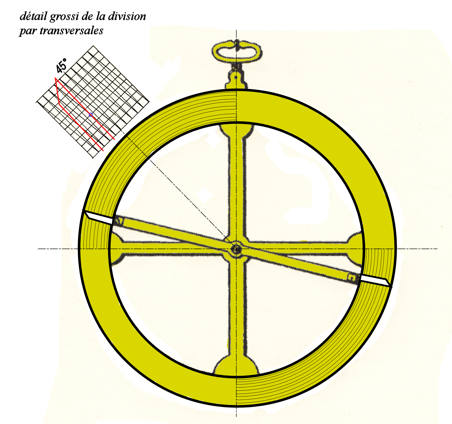 Dessin schématisé de l'astrolabe nautique de l'université de Coimbra avec un détail de la division par transversales.